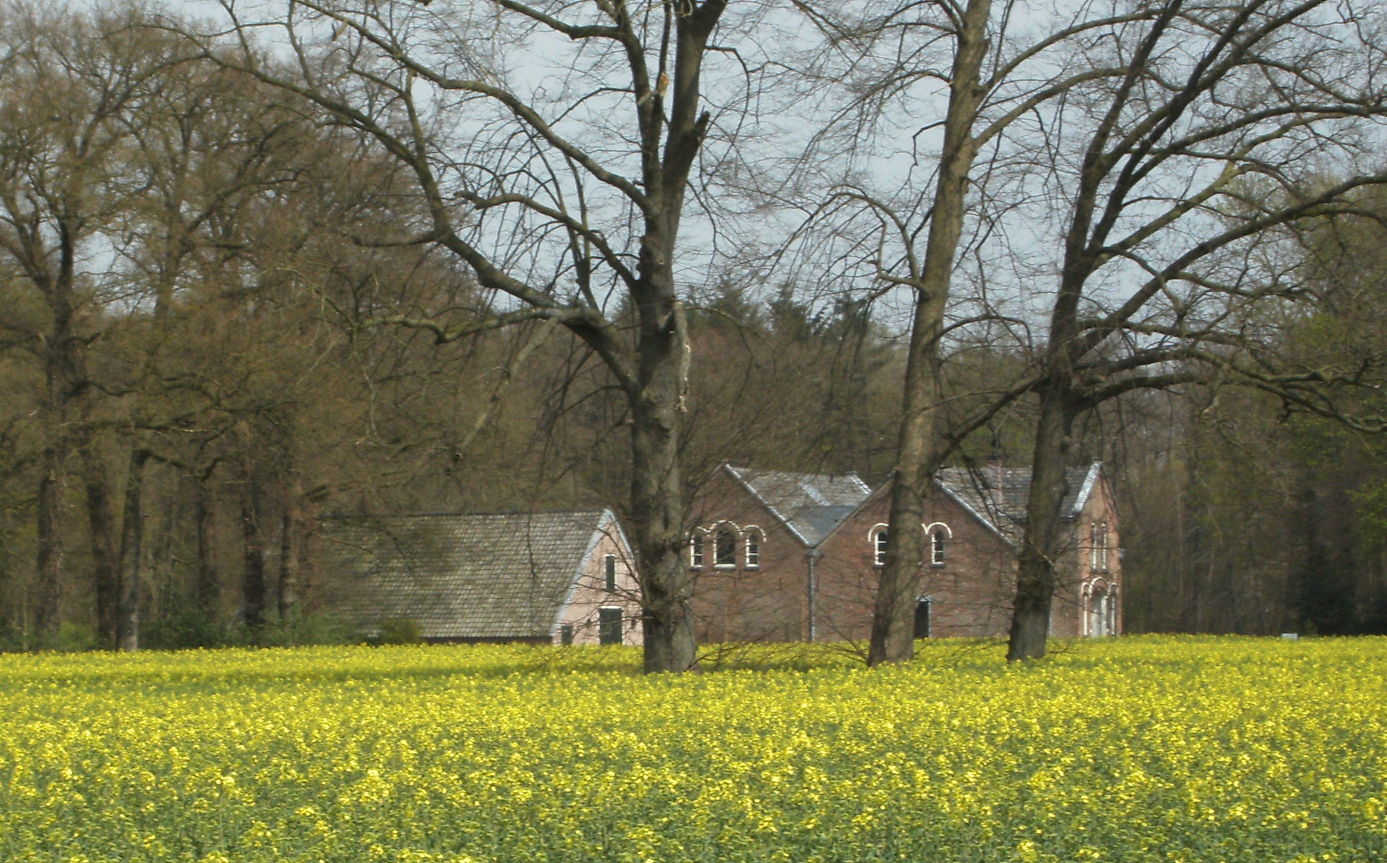 Voormalig koetshuis en boerderij op landgoed Frieswijk bij Deventer met koolzaadveld Old farmhouse on estate Frieswijk in the Netherlands